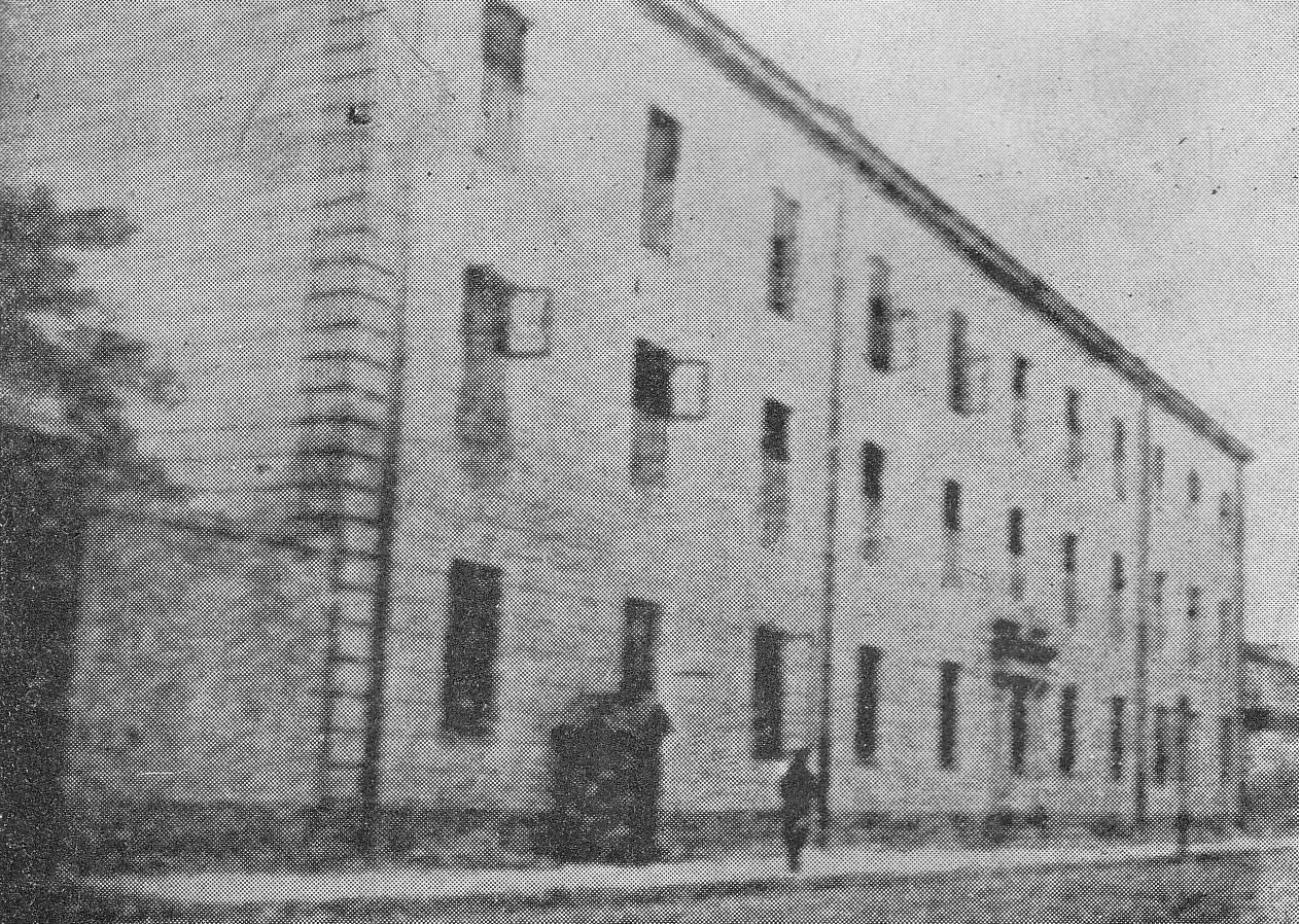 Więzienie kobiece Serbia w Warszawie